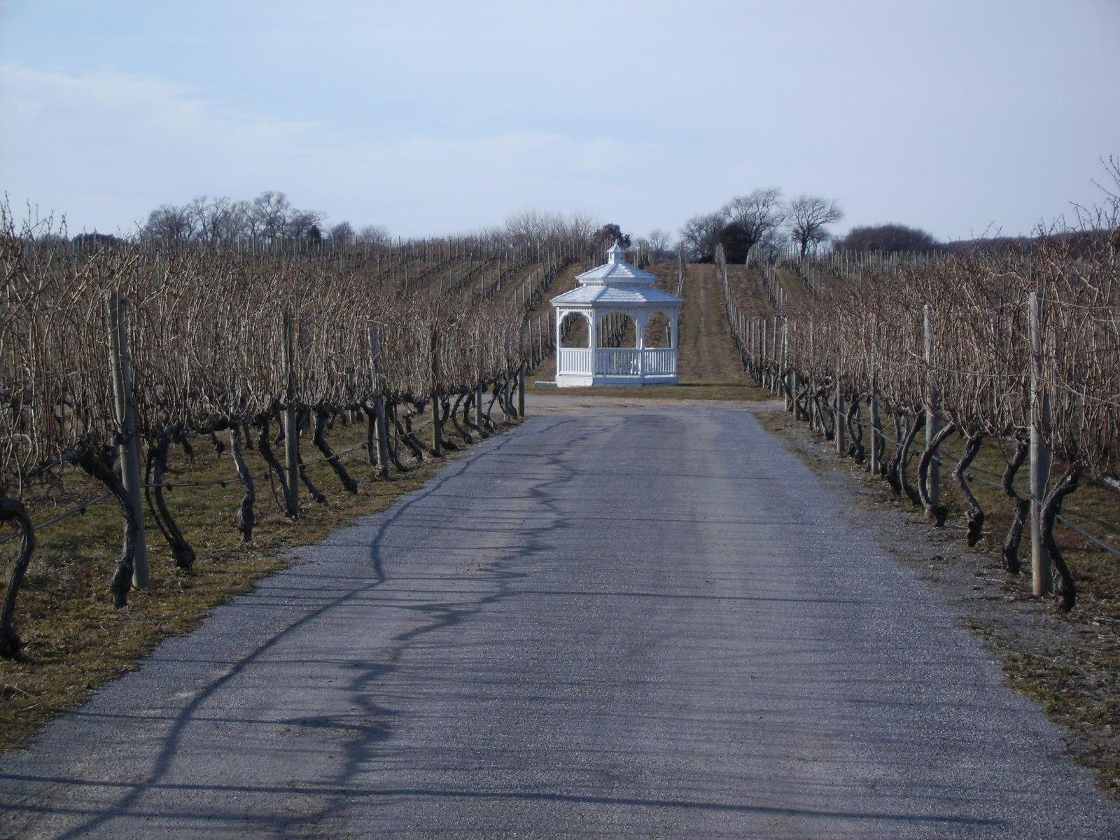 Weinanbau auf Long Island, New York